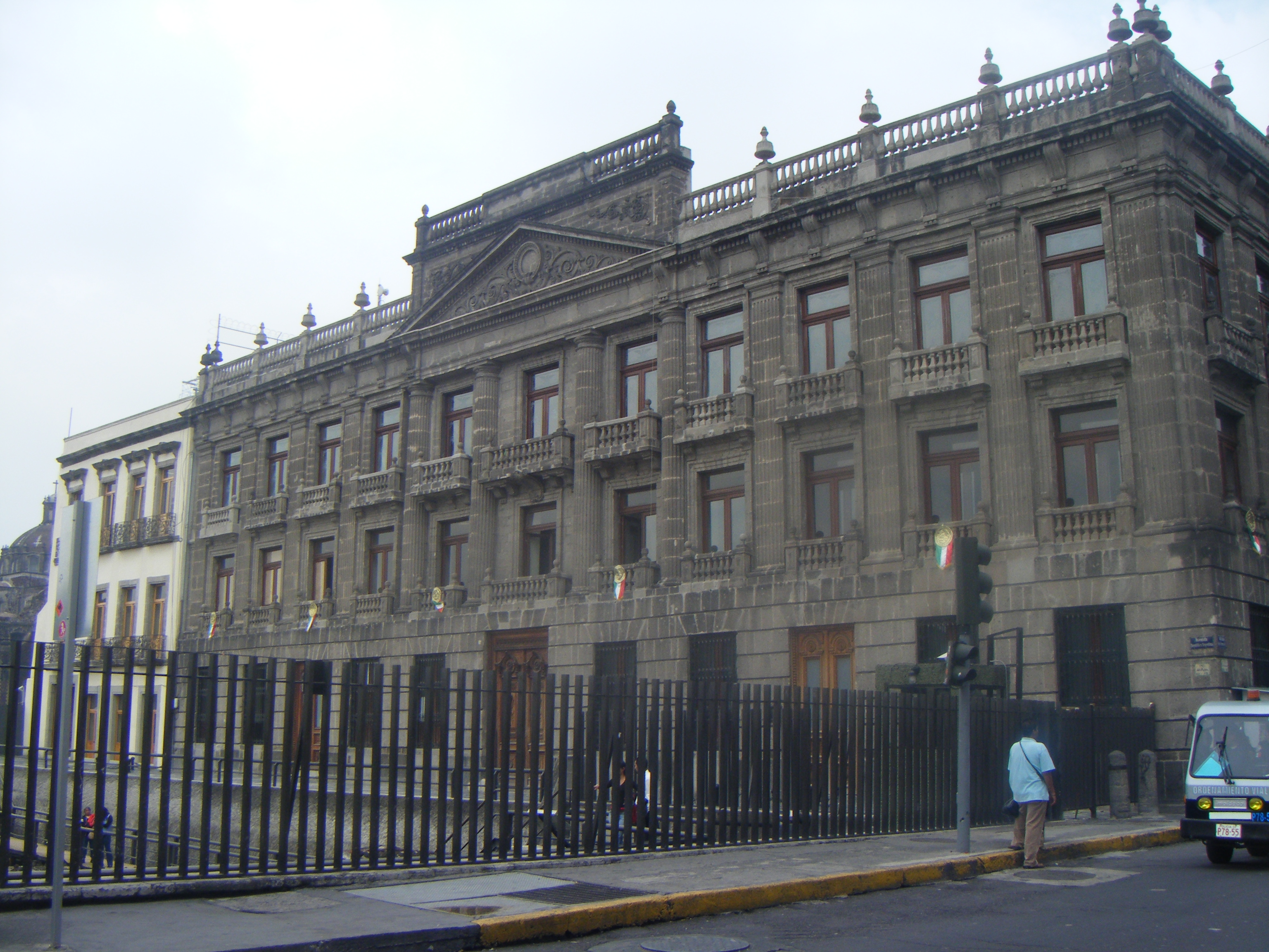 Palacio del Marqués del Apartado. Obra neoclásica de Manuel Tolsá. Ciudad de México.